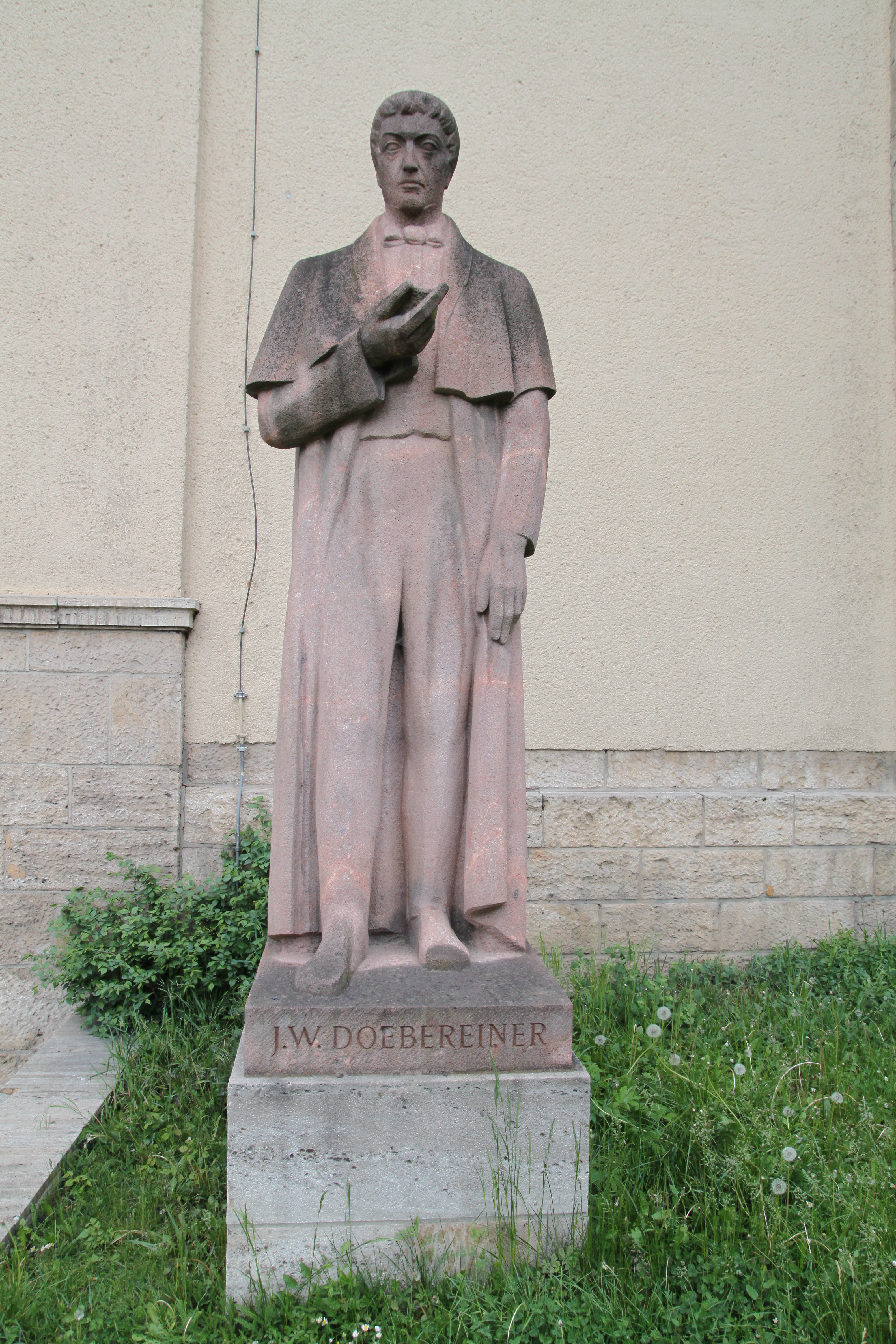 Denkmal J.W.Doebereiner vor dem Hörsaal